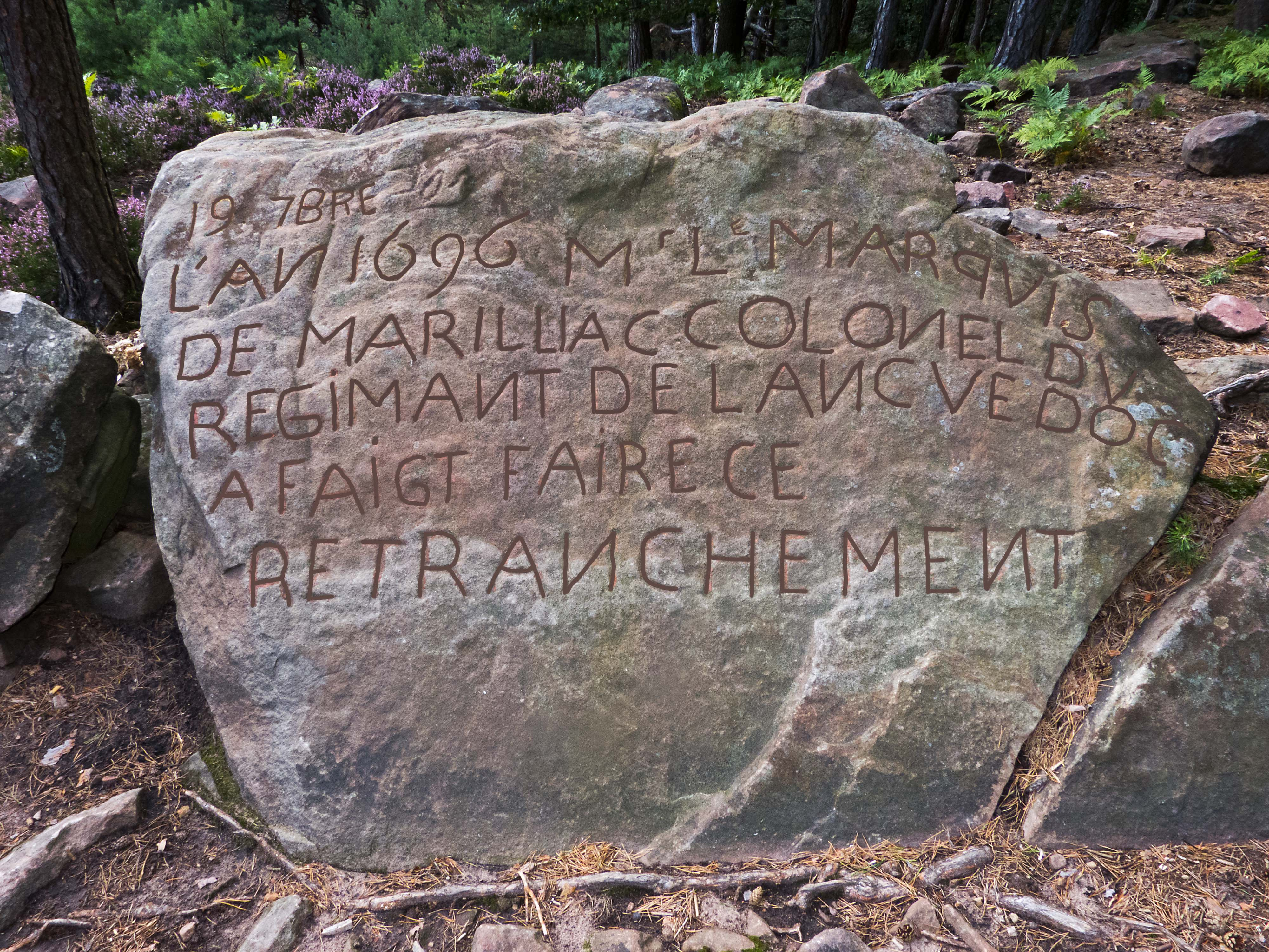 Inschriftenstein auf den Nollenkopf, 1696